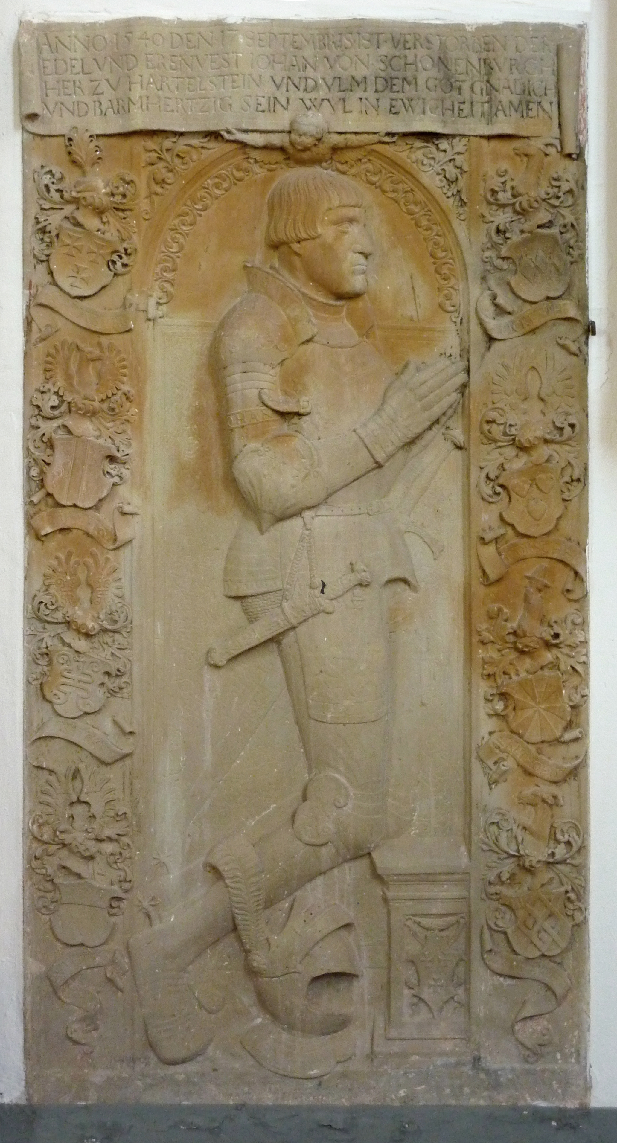 Katholische Pfarrkirche, ehemalige Stiftskirche Unsere Liebe Frau (Mariä Himmelfahrt) in Kyllburg im Eifelkreis Bitburg-Prüm (Rheinland-Pfalz), Grabstein des Johann von Schönenberg (gestorben 1540), mit Inschrift